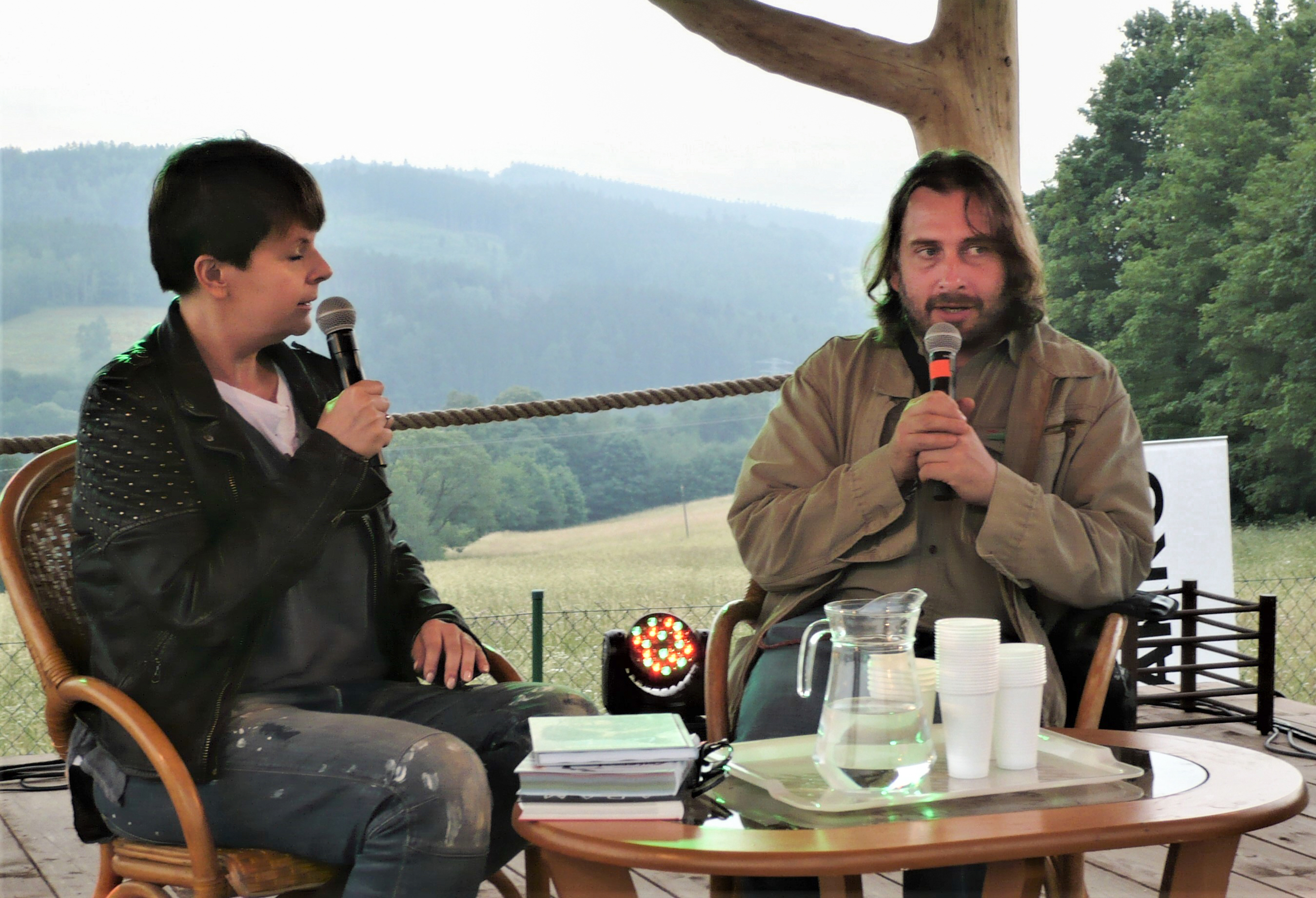 Karolina Korwin-Piotrowska i Adam Wajrak podczas Festiwalu Góry Literatury 2017.